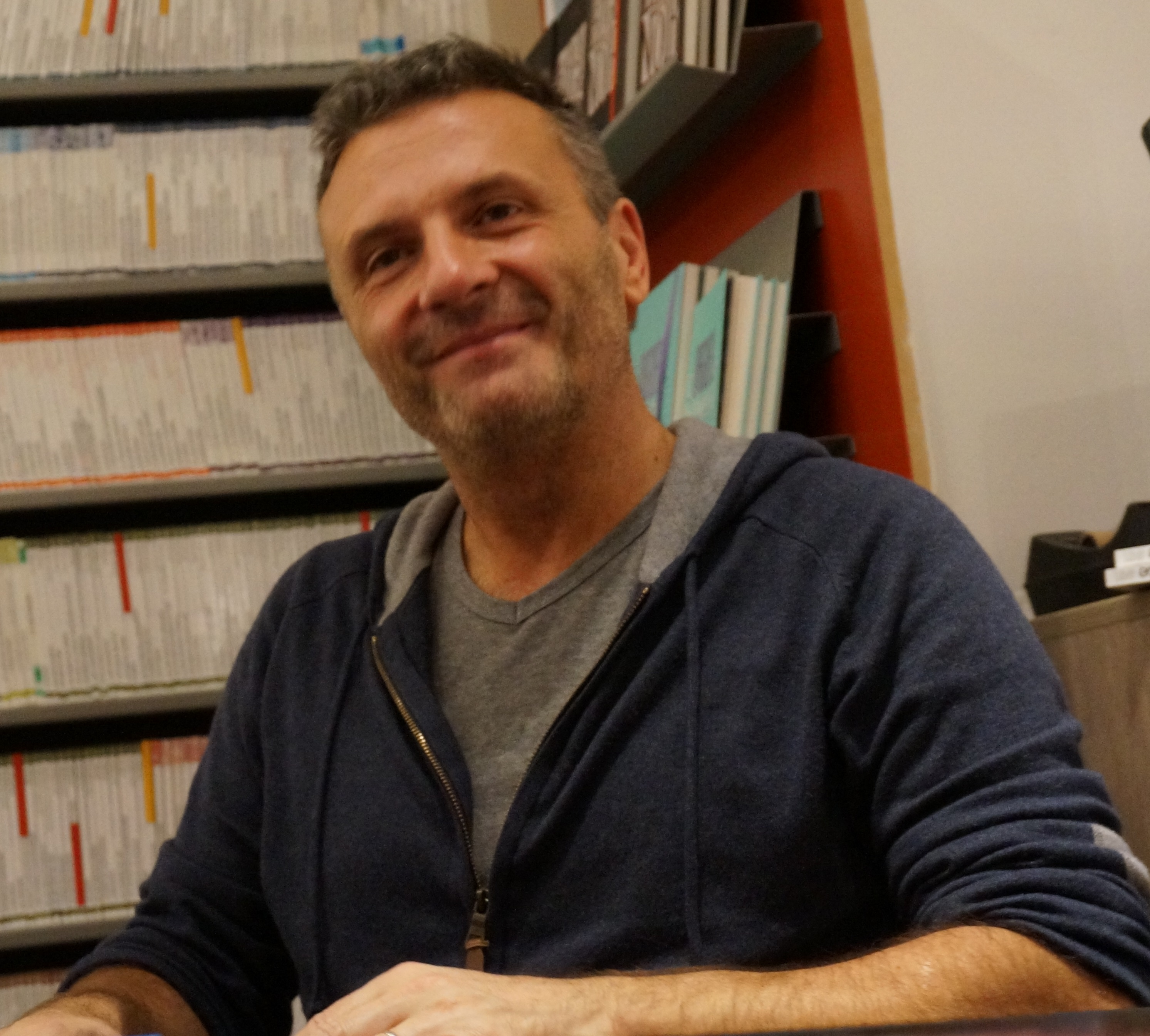 Pascal Bresson dédicaçant.